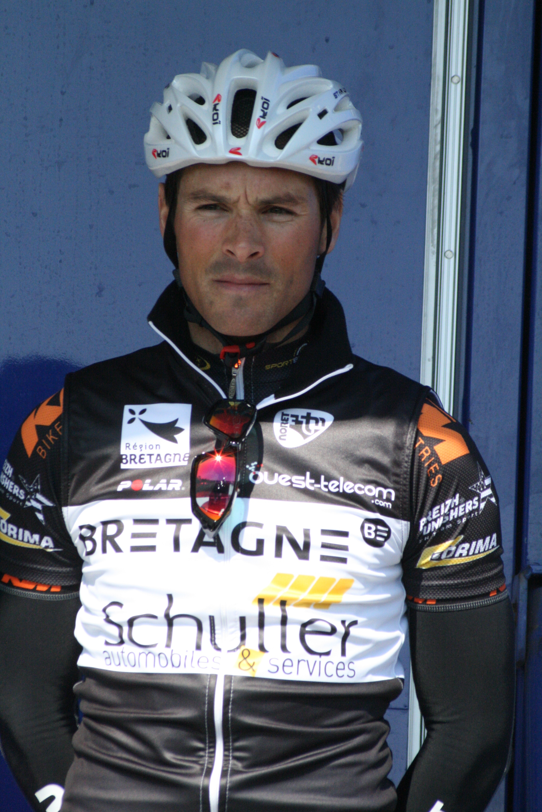 Présentation des coureurs au départ de la première étape Stéphane Bonsergent